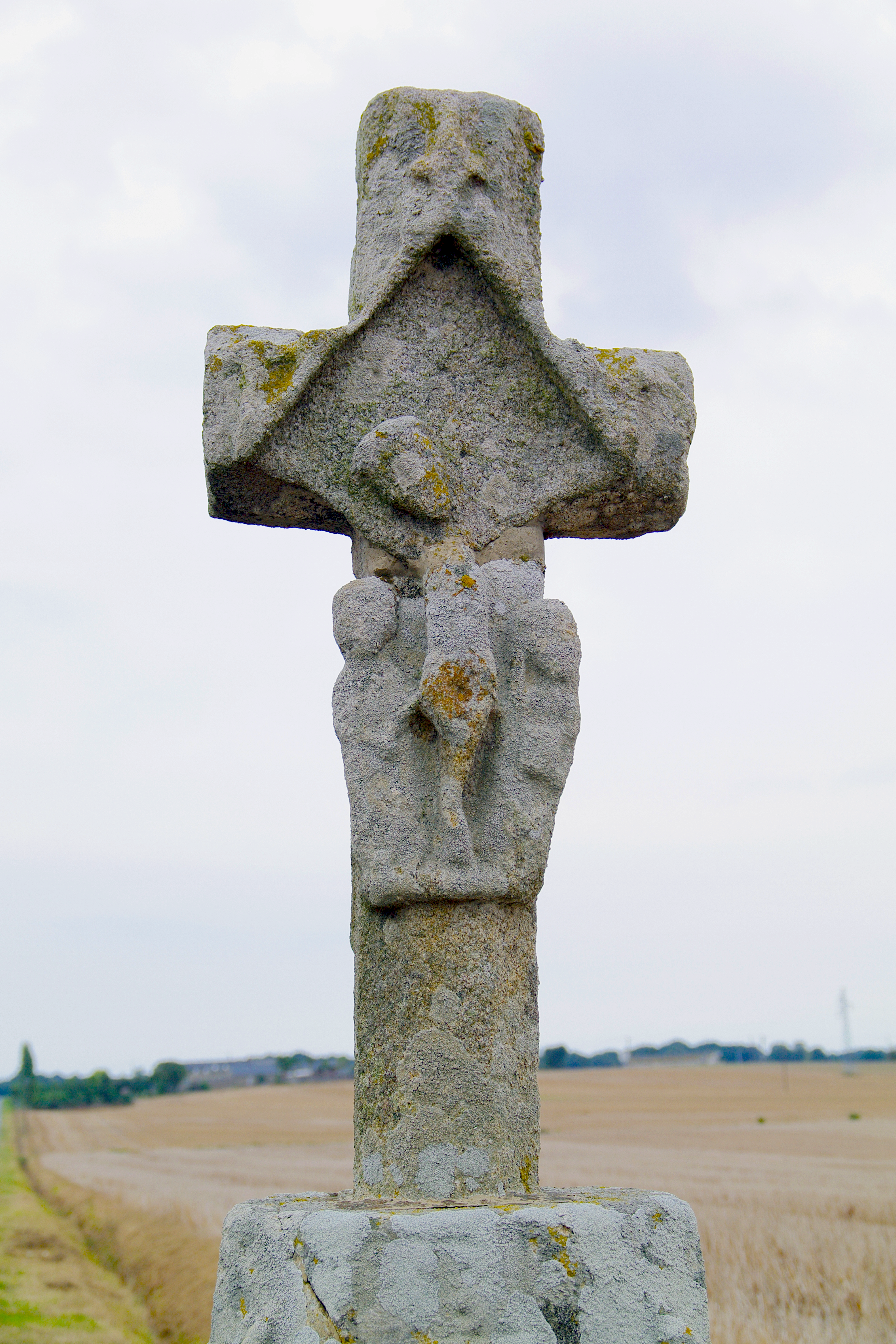 Croix de Saint-Hubert, C.D. 16 (Inscription, 1964) .